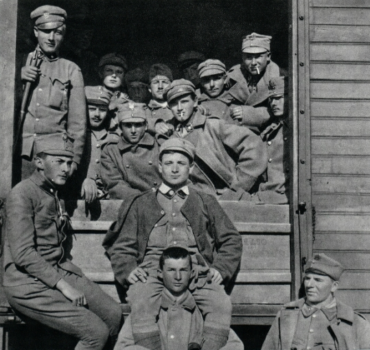 Transport II Brygady Legionów Polskich z Bukowiny na Wołyń. Na zdjęciu ppor. Bogusław Szul-Skjoeldkrona wraz z legionistami ze swej kompanii.